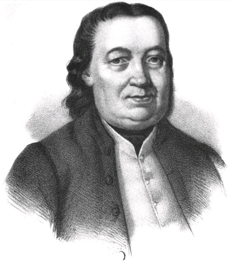 David Möllinger (1709-1786)